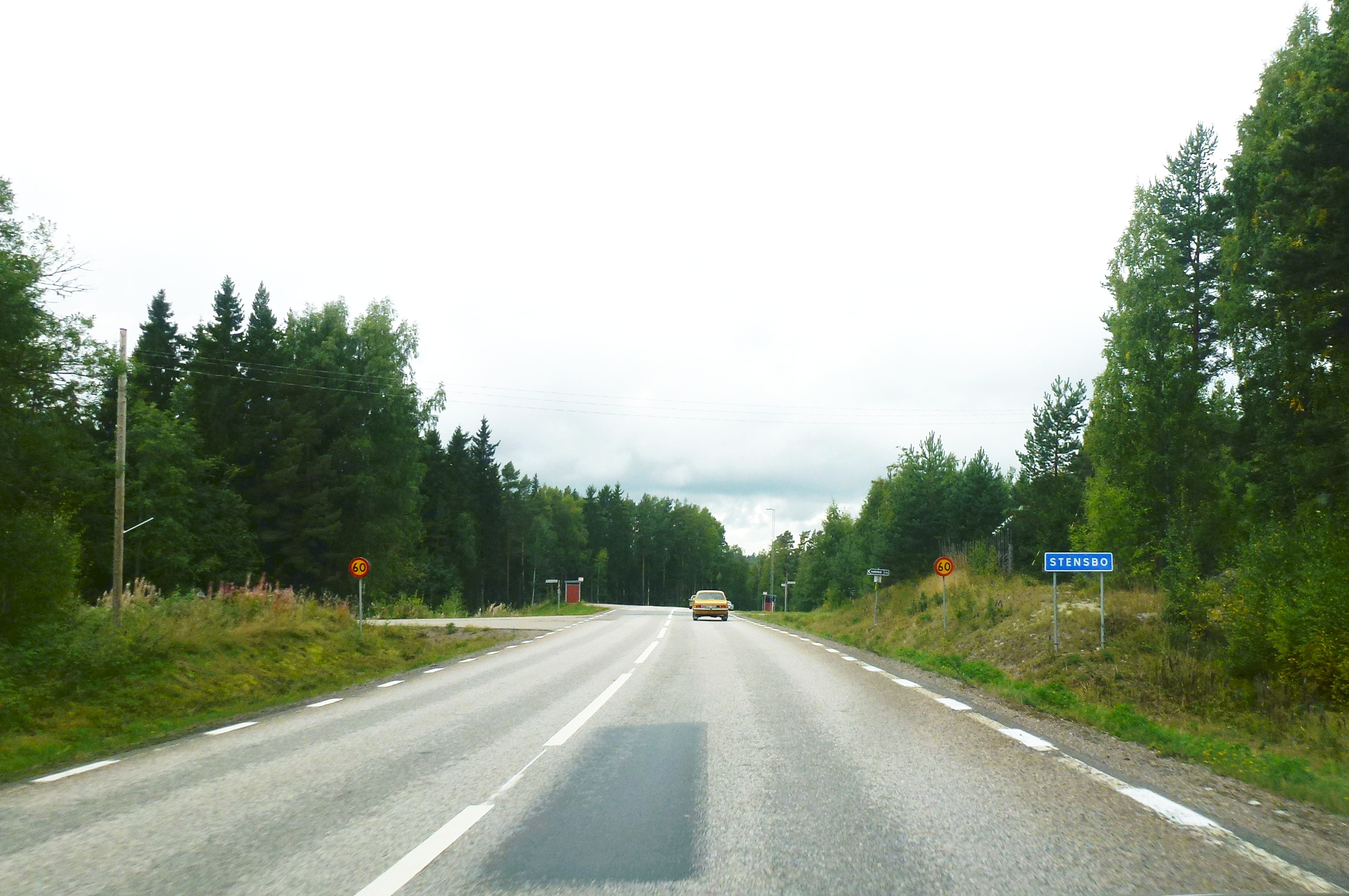 Norra infarten till Stensbo